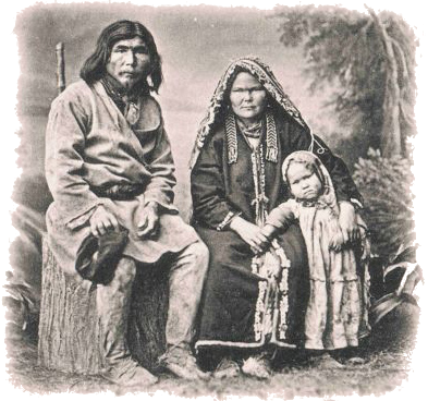 Carte postale. Phototypie Scherer, Nabholz & Co, Moscou. Types de la Russie du Nord. 82. Famille de Vogules. (Mansis)